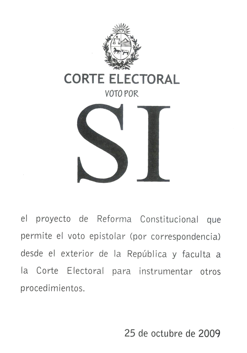 Papeleta que indica el "SI" por la habilitación del Voto Epistolar en el marco del referendum de las elecciones de octubre de 2009 en Uruguay.